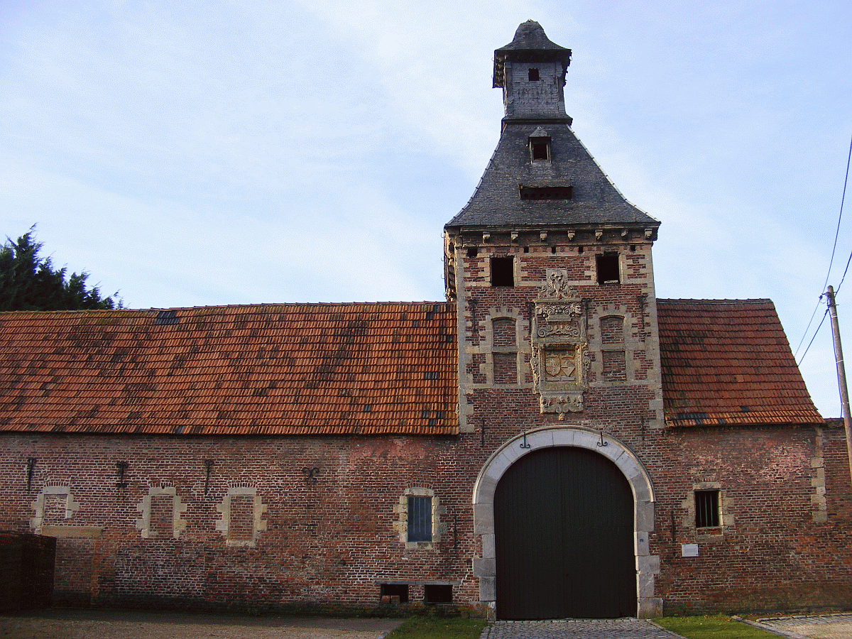 Kasteelhoeve Dessener Wintershoven-Kortessem